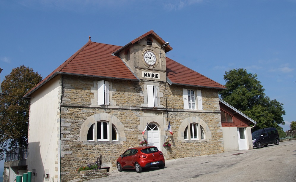 La Mairie